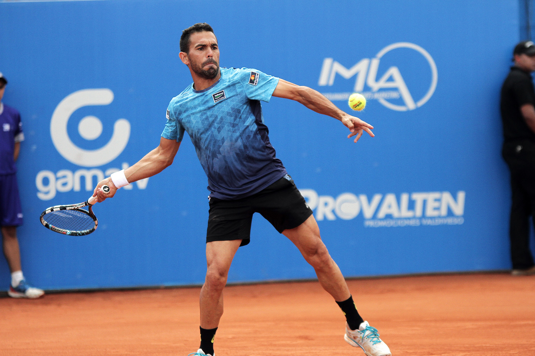 Quito, 08 feb (ANDES).- Final ATP 250 Ecuador Open Quito donde compitieron por el campeonato los tenistas Victor Estrella y Feliciano López. Fotografías: Carlos Rodríguez/ANDES.